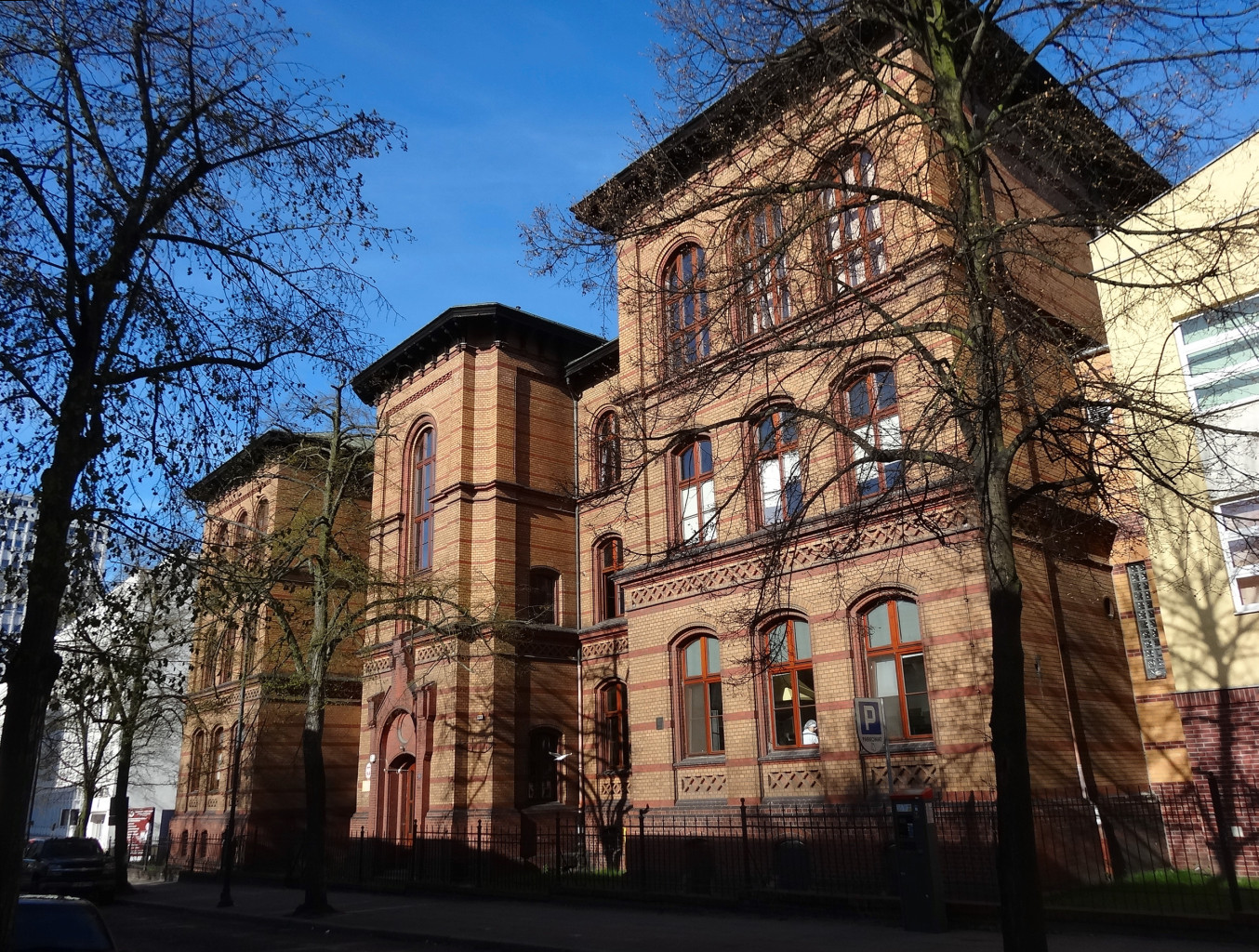 Budynek Zespołu Szkół Gastronomicznych w Bydgoszczy (1882-1884, Wilhelm Lincke) przy ul. Konarskiego